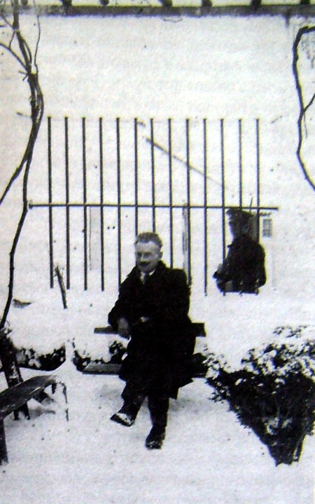 Йосиф Фаденхехт (1873-1953) в Шуменския затвор